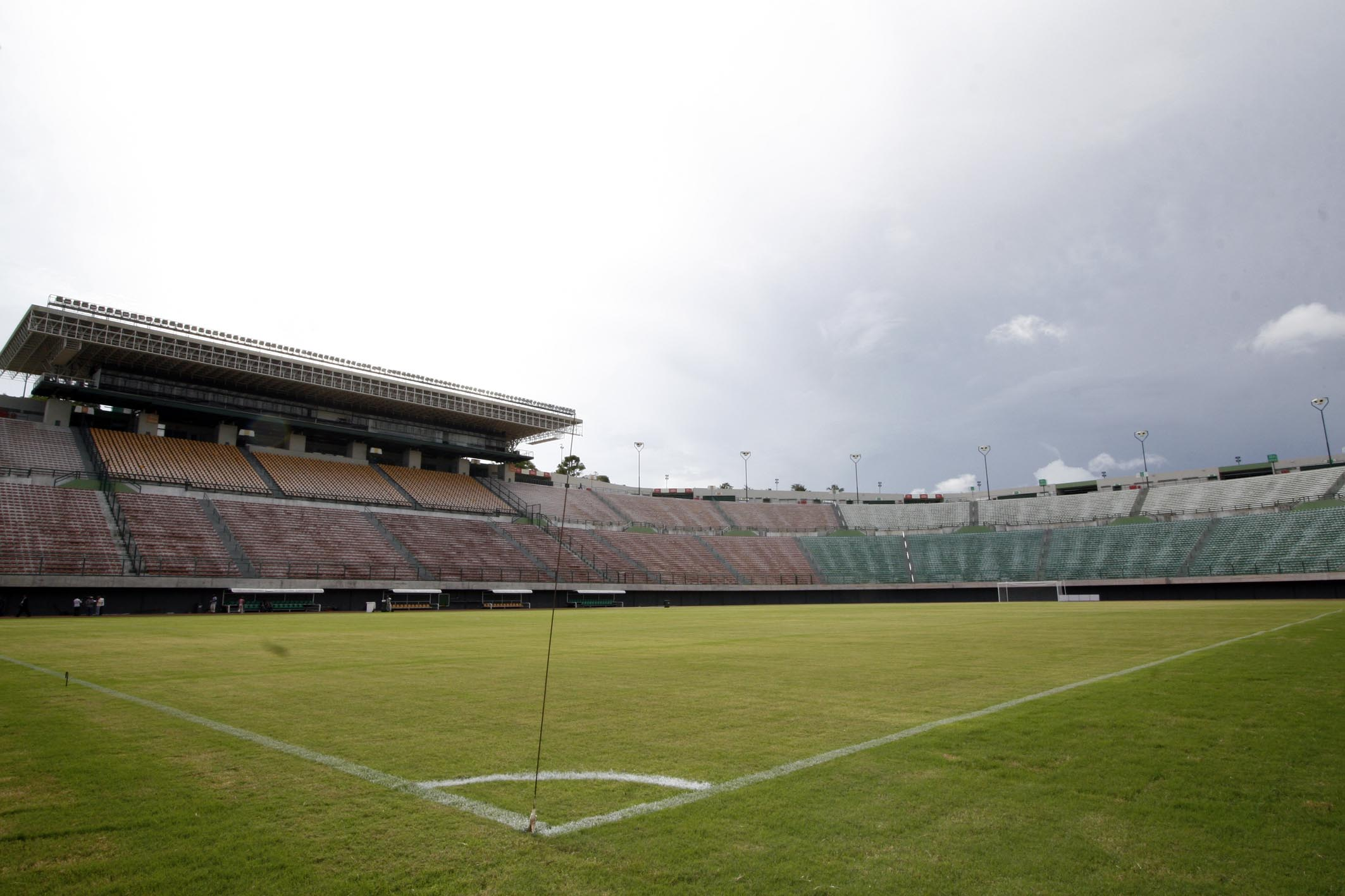 Gramado do Estádio Roberto Santos, em Pituaçu, tem previsão de entrega para a próxima semana. Na foto: Gramado do Estádio Roberto Santos, em Pituaçu, após a recomposição feita. Foto: Rafael Martins/AGECOM